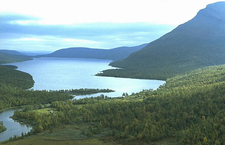 Matsokudden och Stor-Tjulträsket. Motiv: Tjulträsk Nyckelord: Flygbilder, Riksintressen Kategori: Fjällbygd Matsokudden och Stor-Tjulträsket.